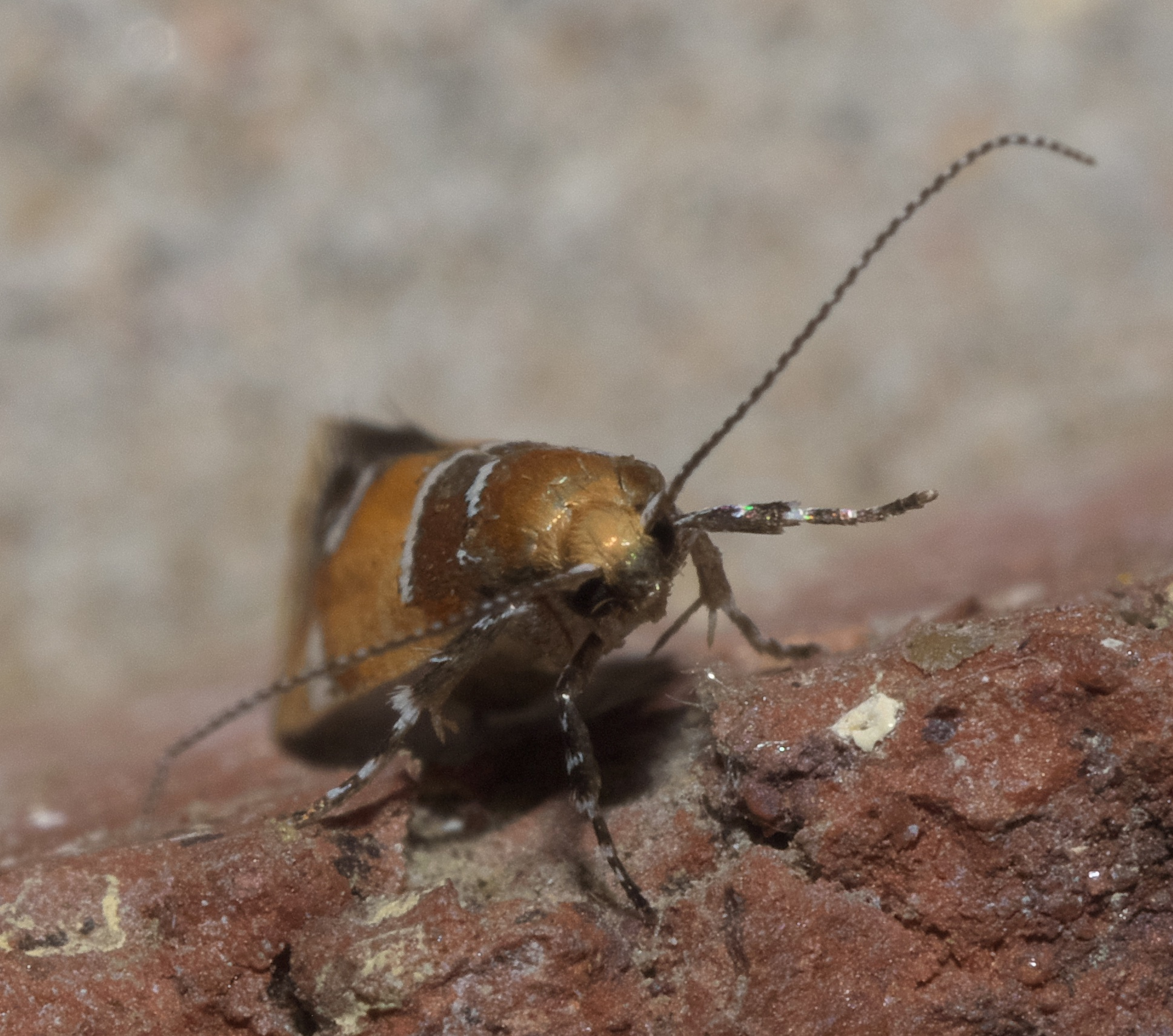 Epicallima argenticinctella, orange-headed epicallima, ID Confidence: 87